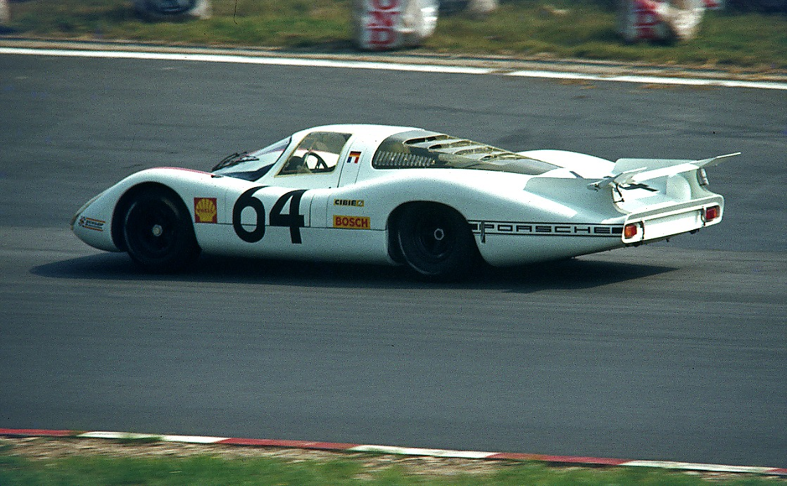 Porsche 908 Langheck von 1969 bei einer Demonstrationsrunde auf dem Nürburgring